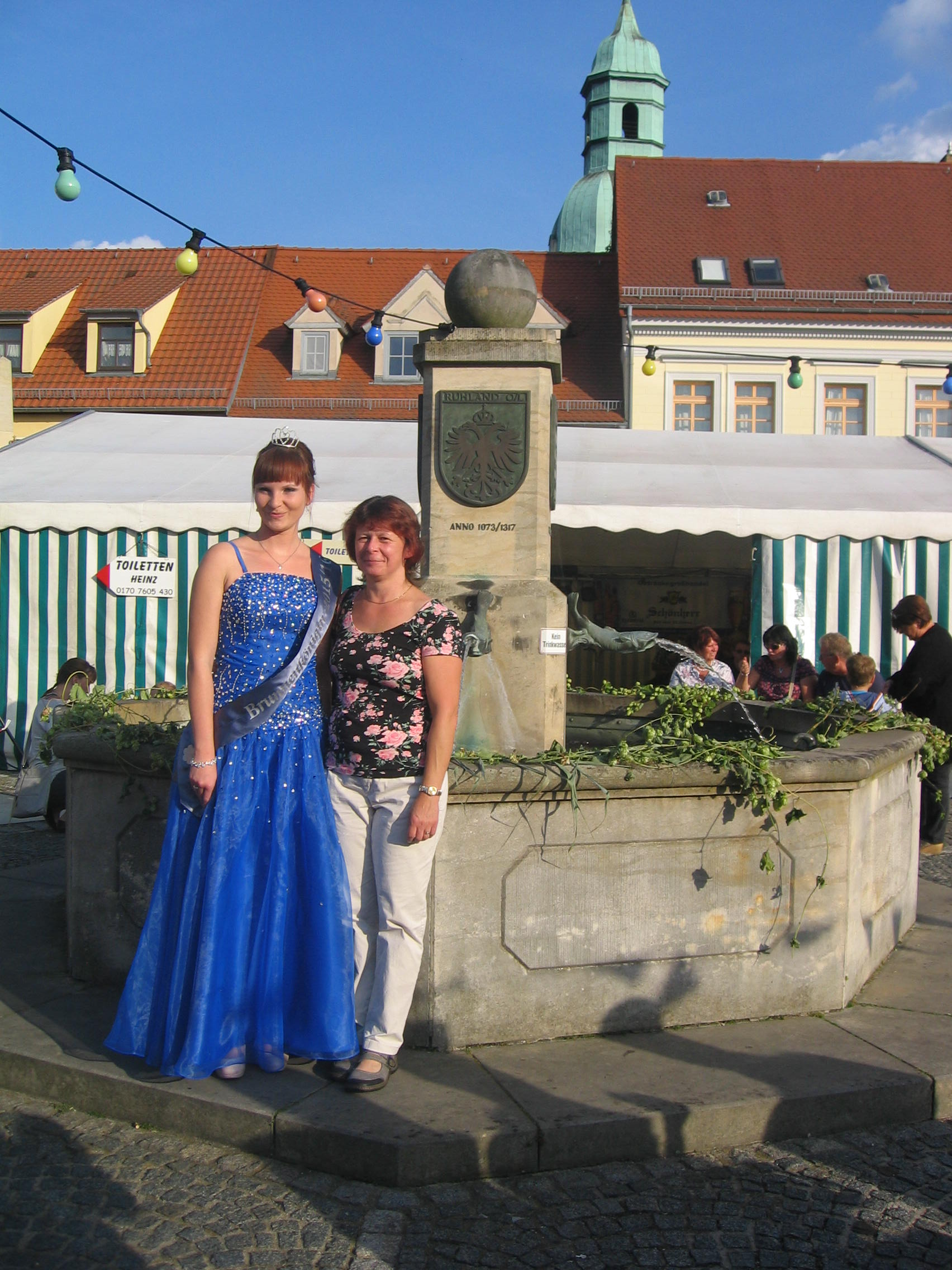 Marktbrunnen in Ruhland mit Brunnenkönigin, beim Herbstfest 2016